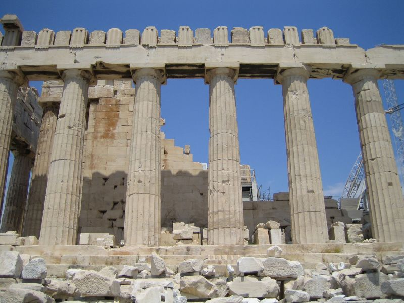 Fachada su del Partenón. El Partenón (del griego Παρθενος Parthenos -Virgen-; uno de los adjetivos que servían de sobrenombre a Atenea) es el templo griego de orden dórico, situado en la Acrópolis de Atenas dedicado a Atenea Parthenos. De mármol blanco del monte Pentélico, fue iniciado por Pericles y se desarrolló entre los años 447 y 432 adC. Los arquitectos encargados de la obra fueron Ictino y Calícrates y estuvieron bajo las órdenes del famoso escultor ateniense Fidias.